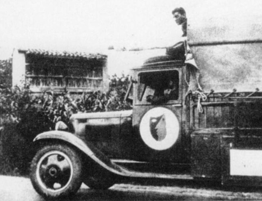 O camión do grupo La Barraca, rumbo a Vigo, no ano 1932